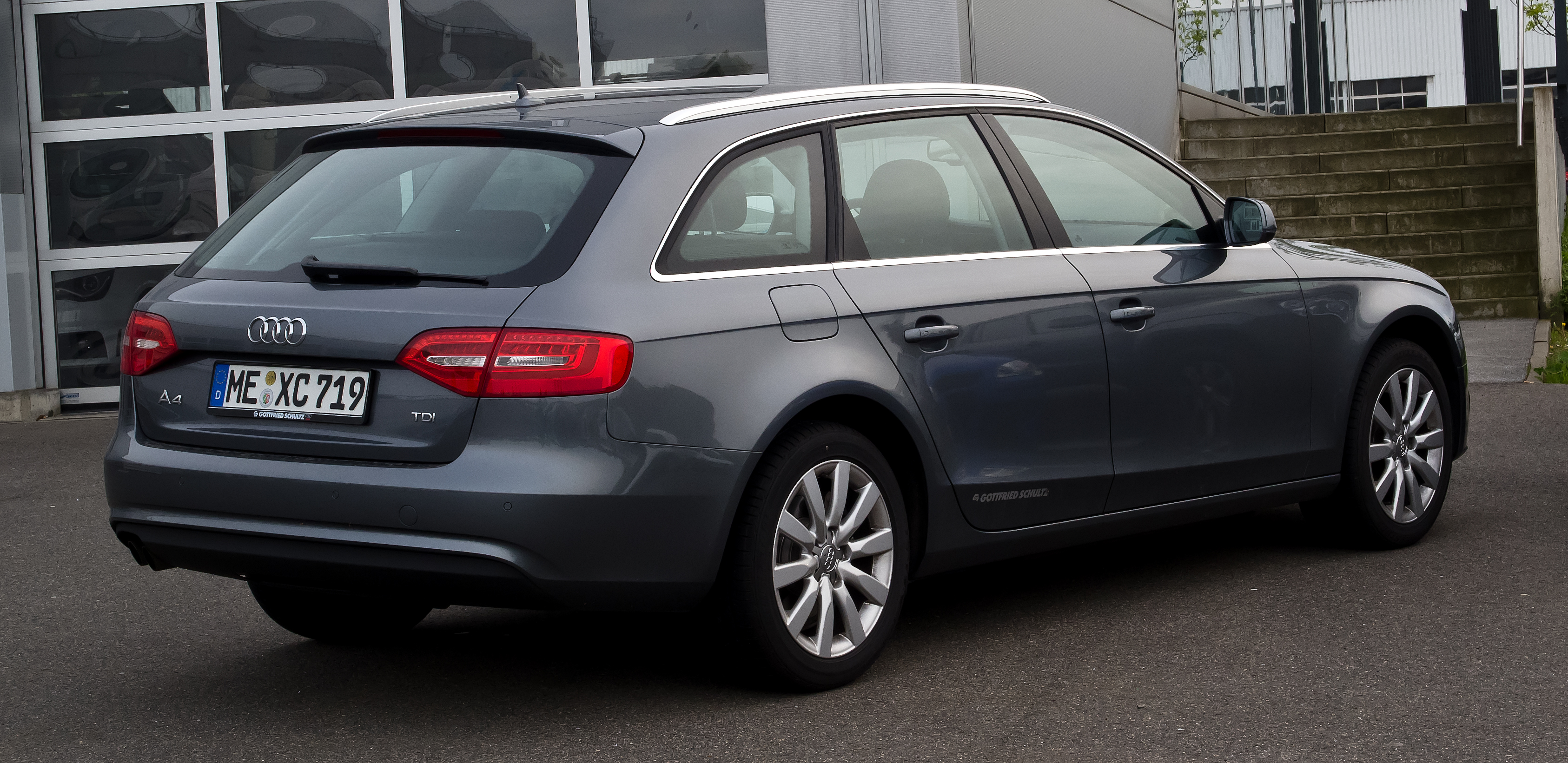 Audi A4 Avant 2.0 TDI Ambiente (B8, Facelift)